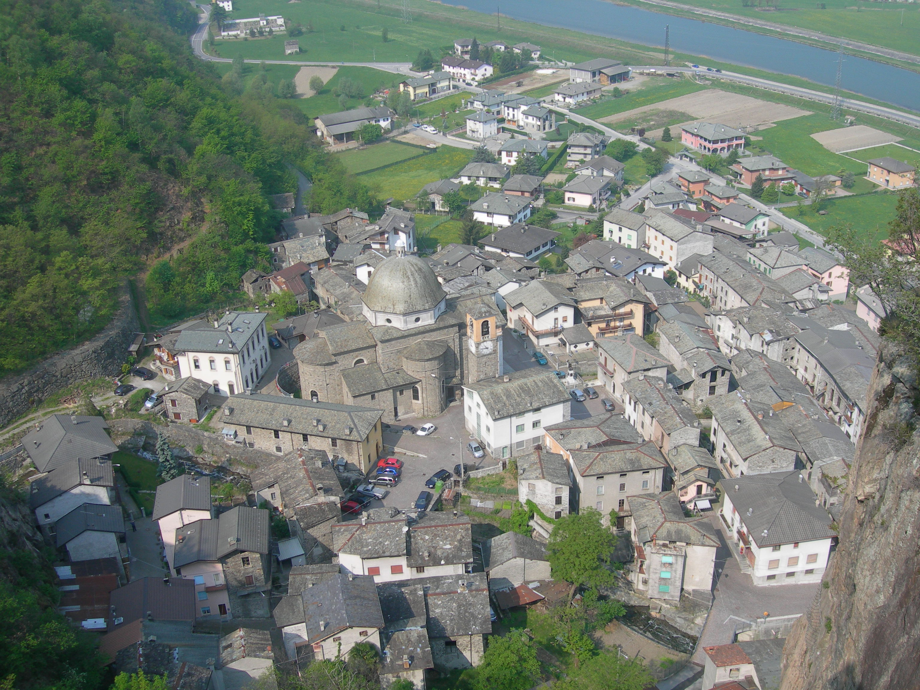 Forcola, frazione di Sirta, con la chiesa di San Giuseppe e la sua caratteristica cupola, visto dalla parete della Caurga sopra il paese